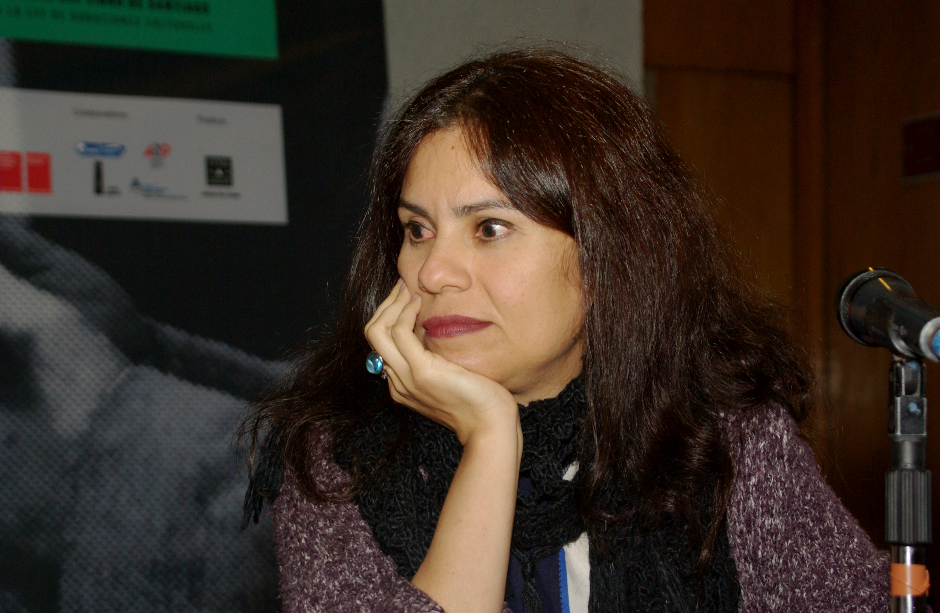 La escritora brasileña Carola Saavedra en la Feria Internacional del Libro de Santiago 2015